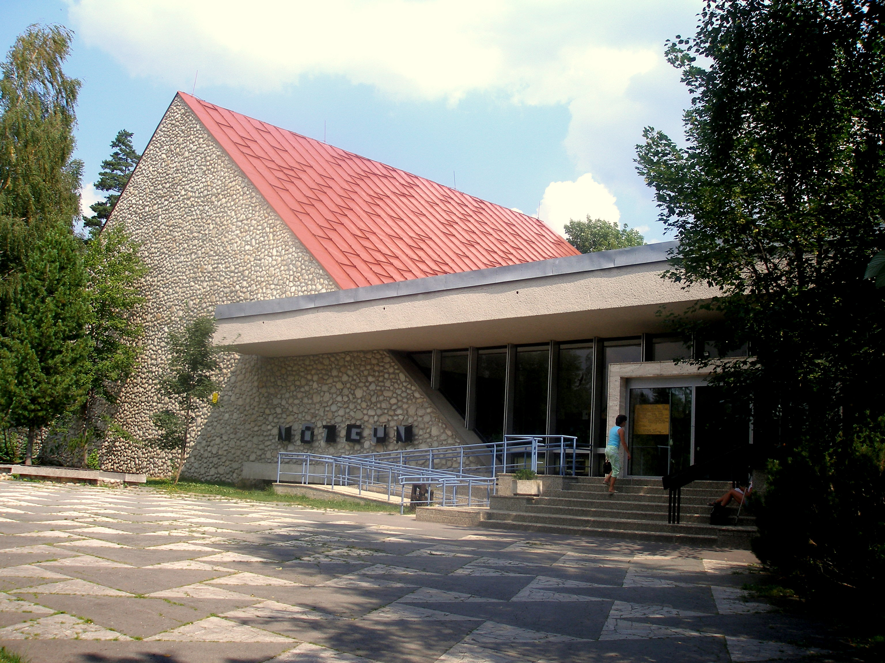 Osada Tatranská Lomnica, Slovakia. Vchod do budovy múzea TANAP.